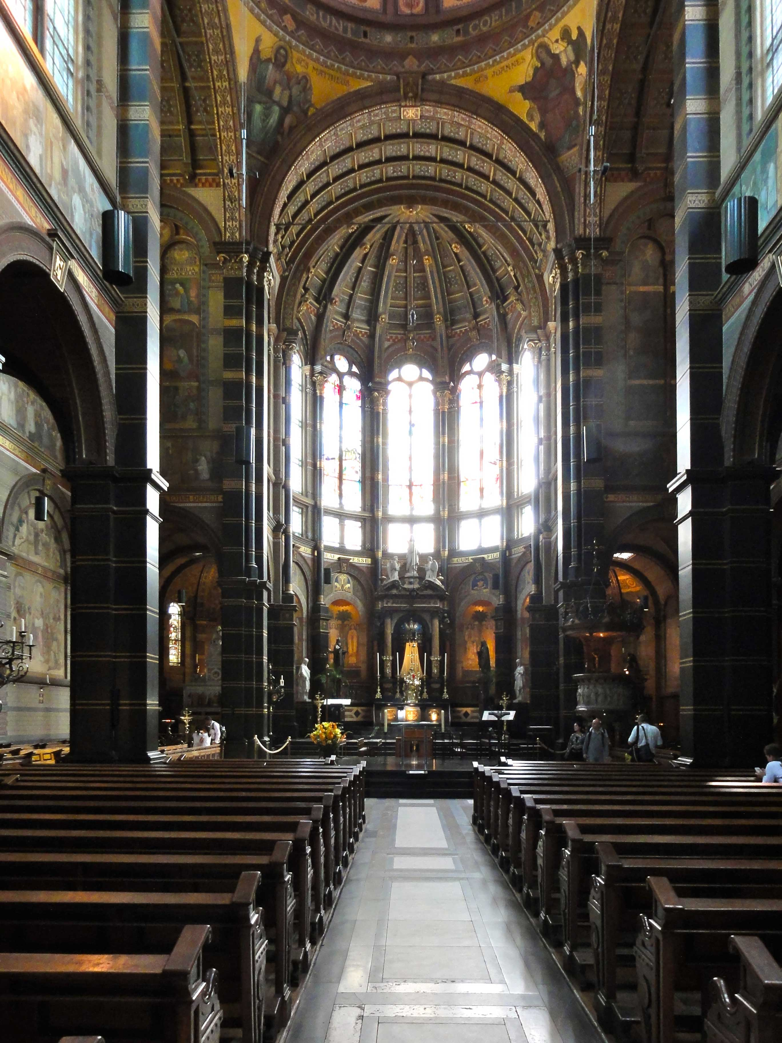 Sint-Nicolaaskerk Amsterdam